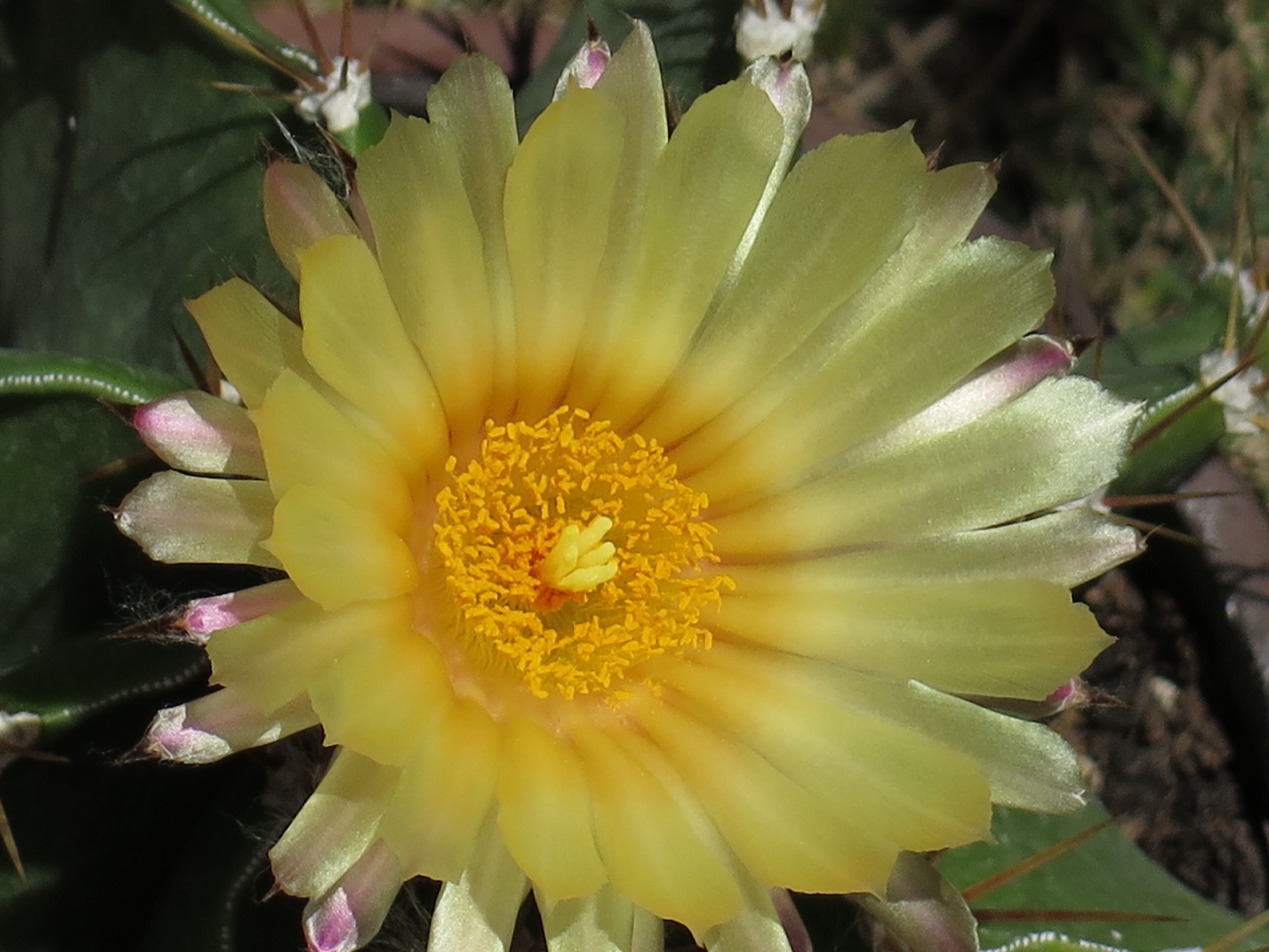 Il fiore dell'astrophytum ornatum